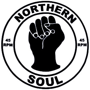 Das Zeichen der Northern-Soul-Bewegung